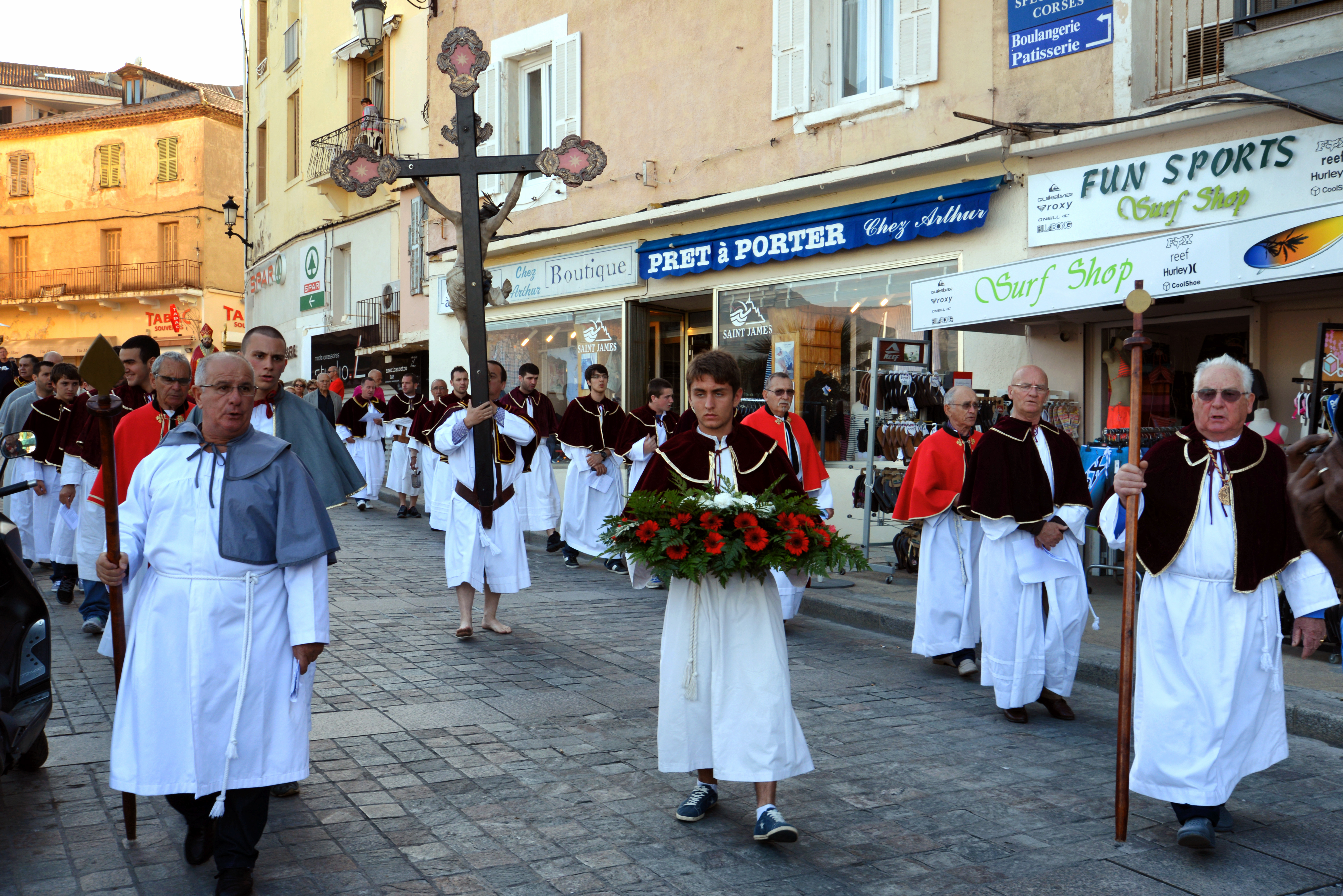 Calvi, Balagne (Corse) - Procession de la Saint-Érasme au port de plaisance